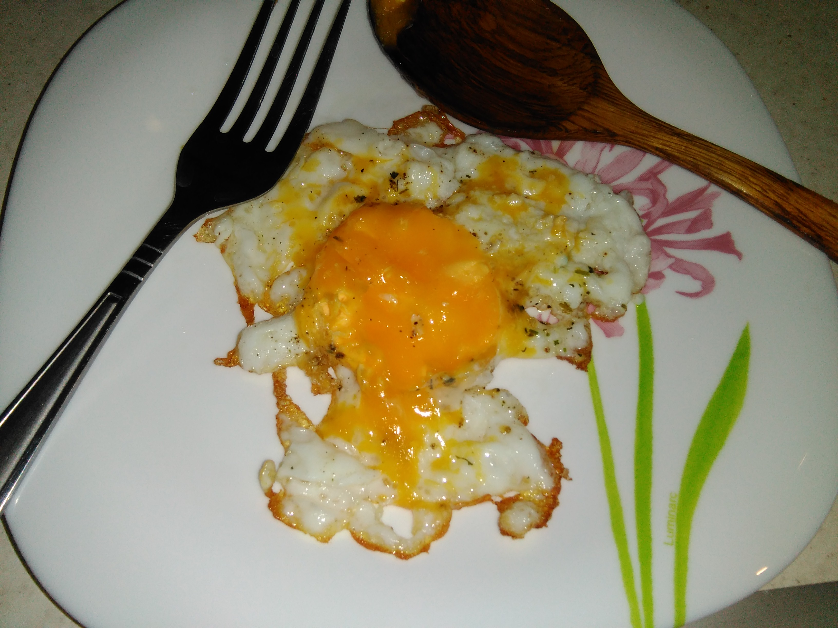 نمیرو ساده ایرانی